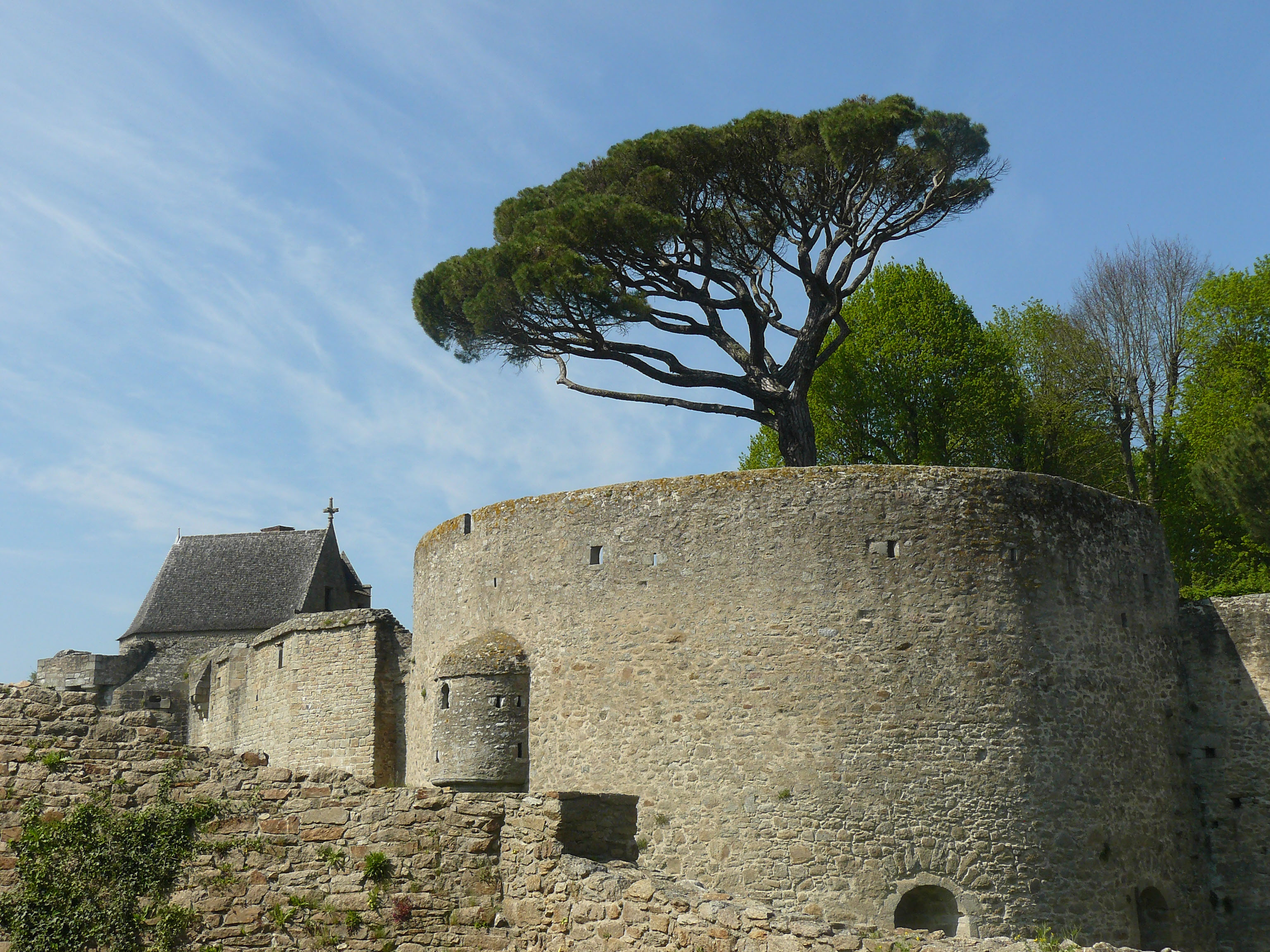 Tour demi-ovale sud-ouest du château de Clisson